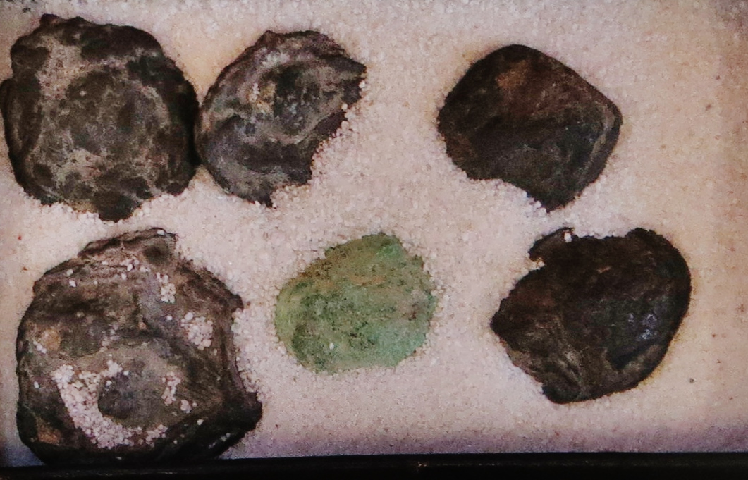 Fossil of plant - Took the picture at Natural History Museum, Bonn University